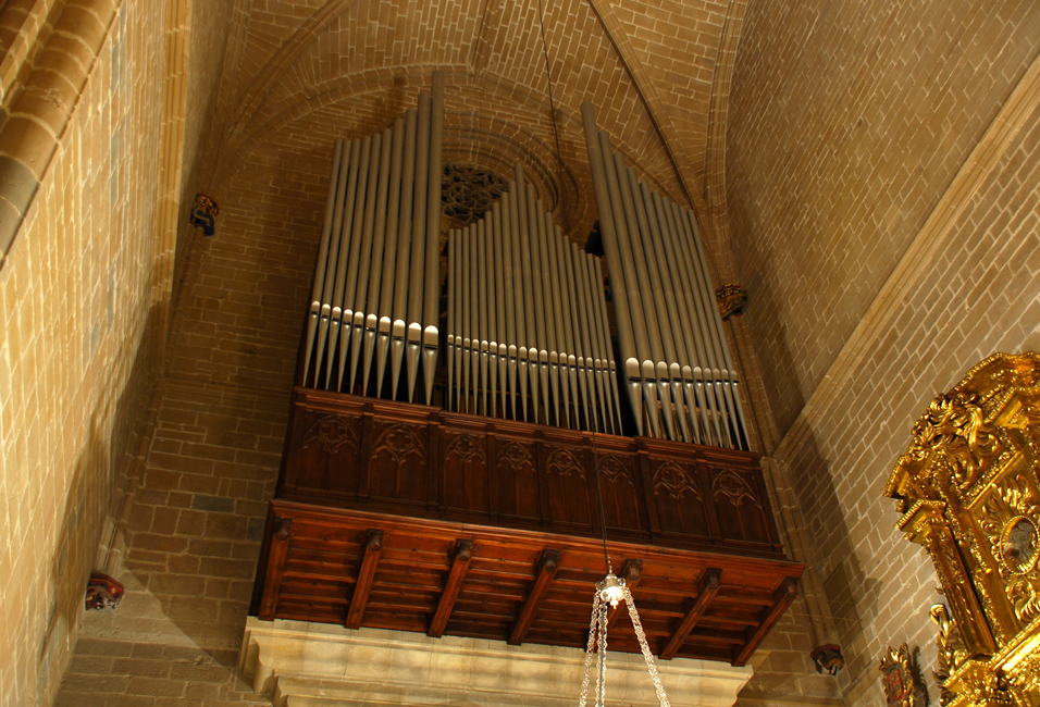 Órgano catedral de Pamplona